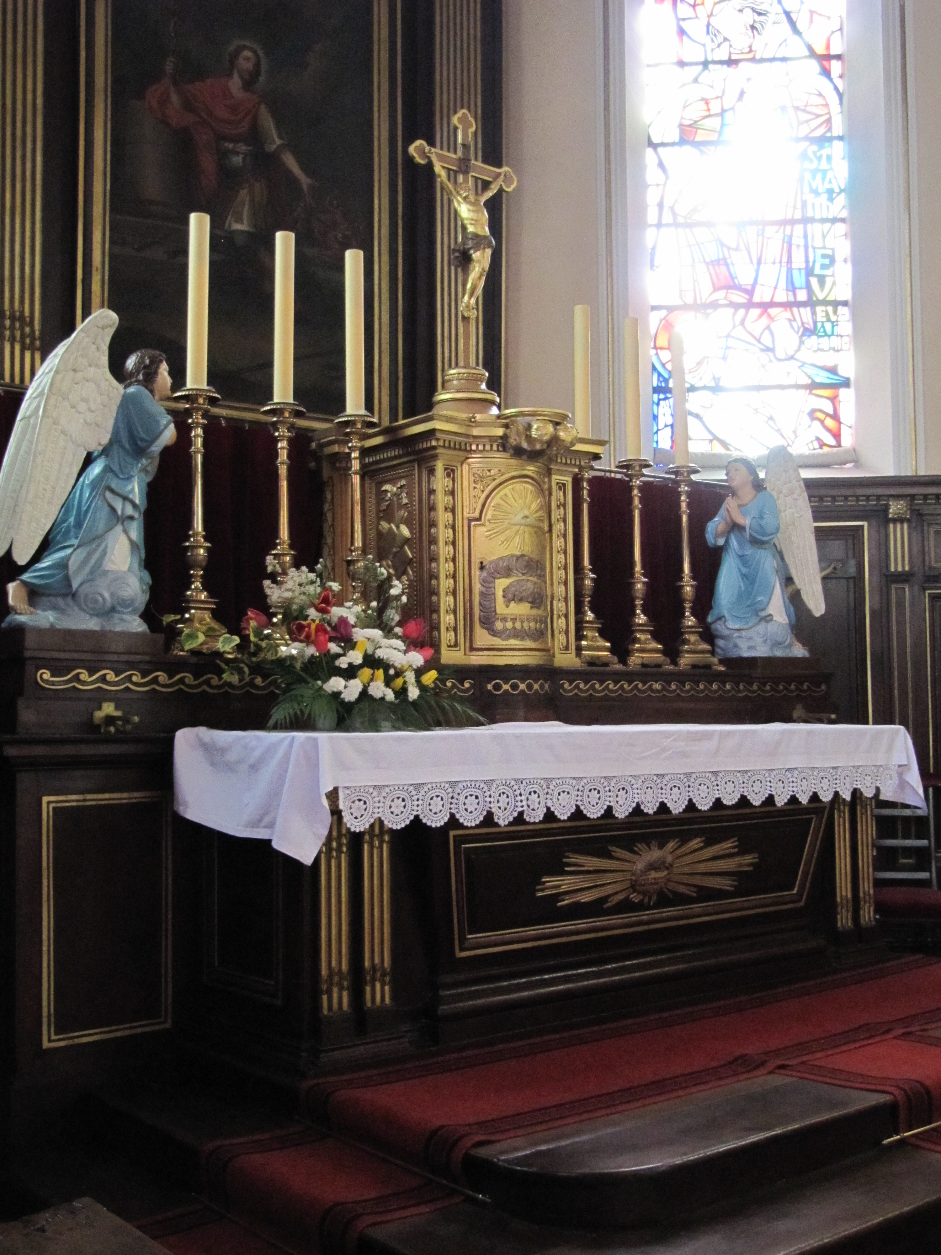 Lupstein, église Saint Quentin (maître-autel)